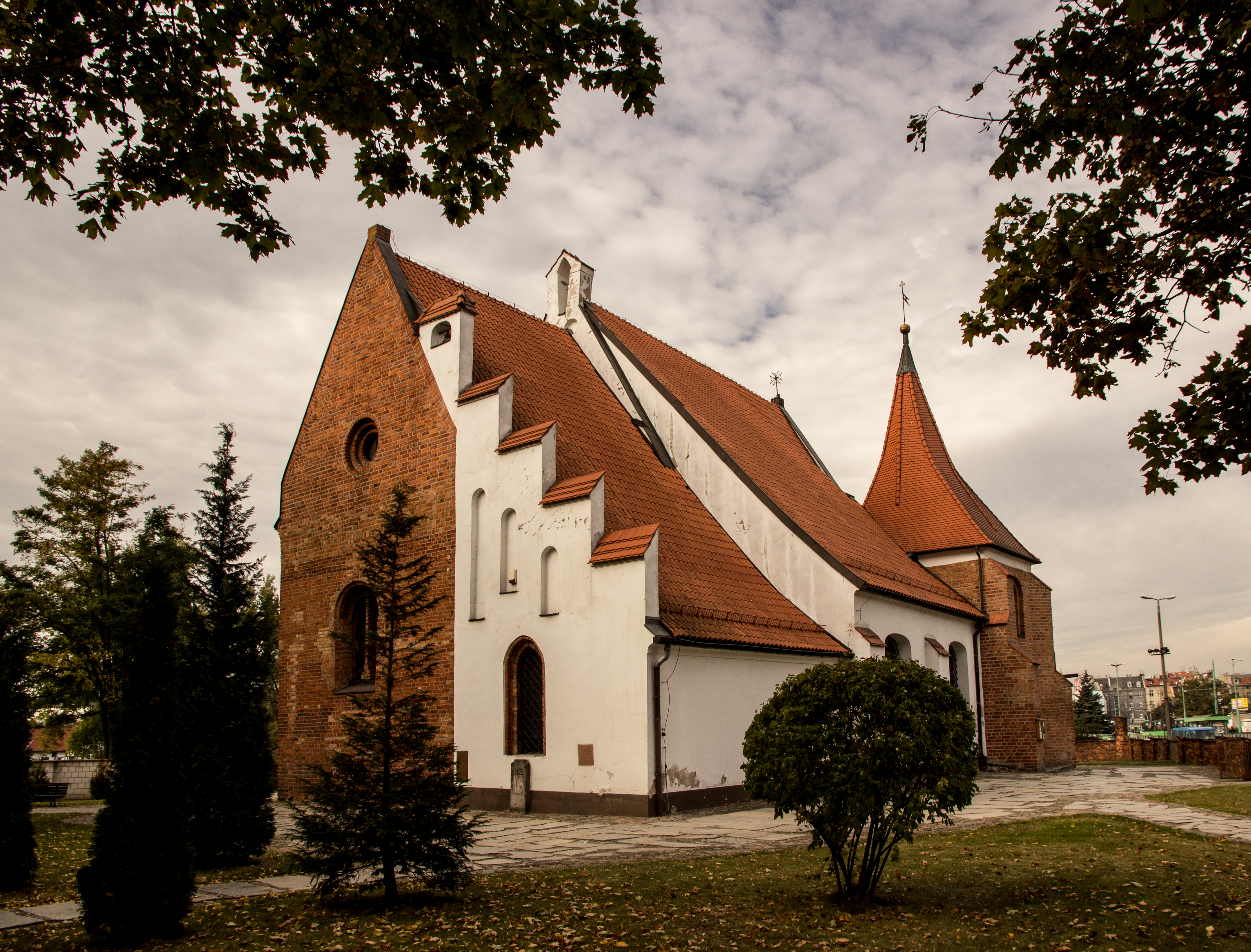 Kościół św Jana jerozolimskiego Poznań